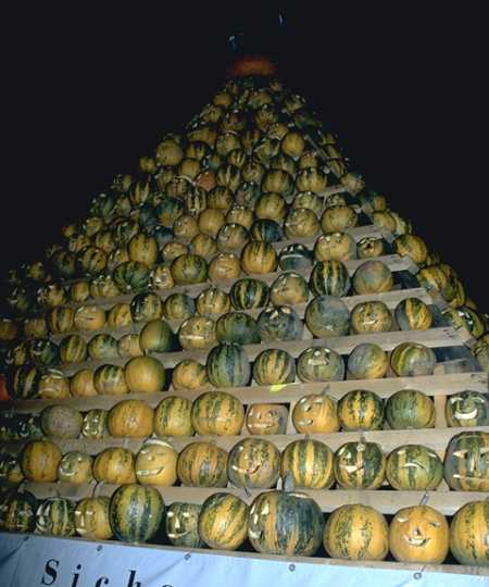 Kürbispyramide in Obermarkersdorf (Niederösterreich)